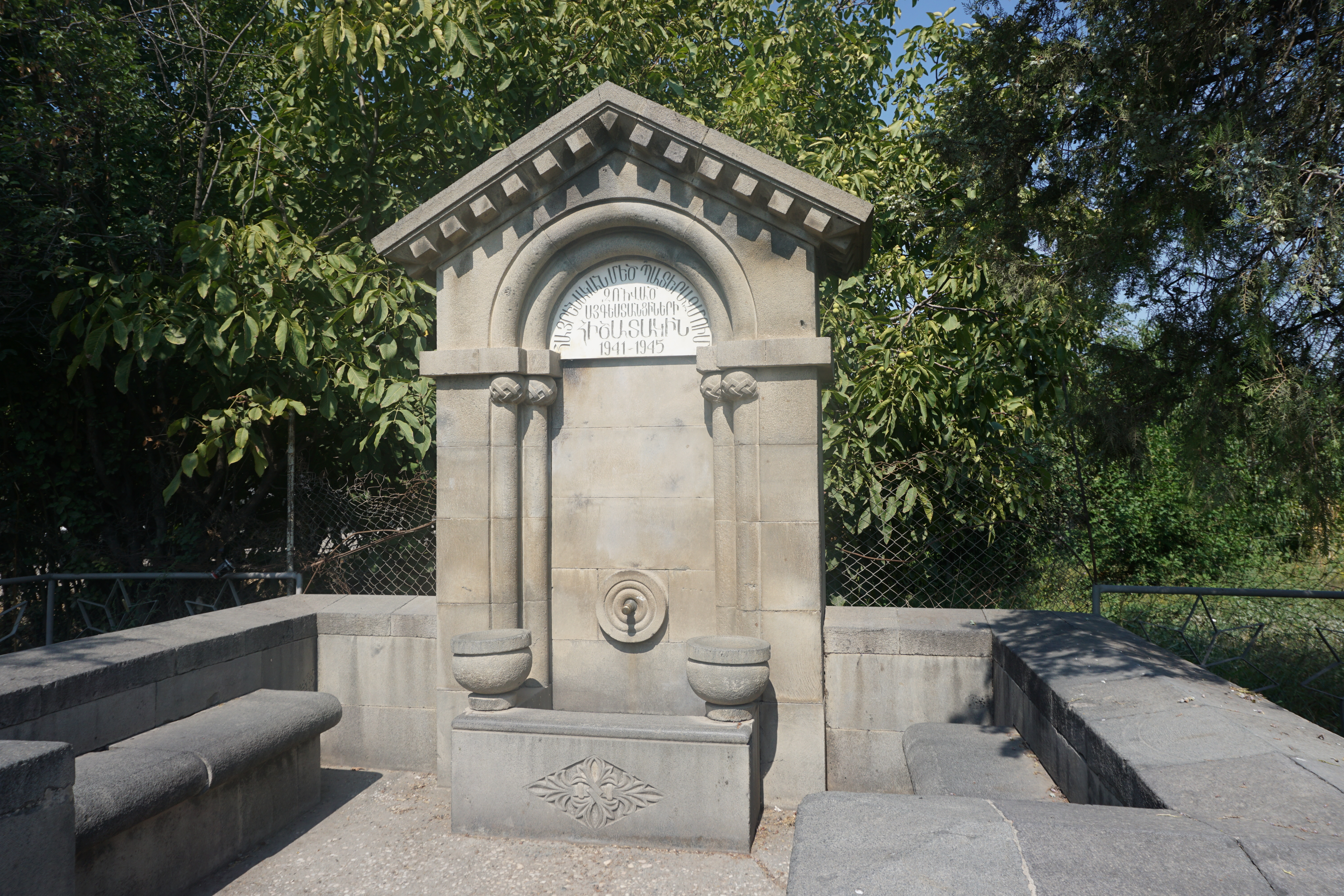 Հուշաղբյուր, Այգեստան, Արարատի մարզ 11/3